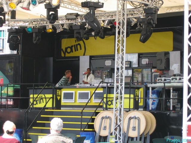 Foto door Fruggo, augustus 2004, Groningen. Yorin FM op de Grote Markt in Groningen tijdens de KEI-week. CC-BY.